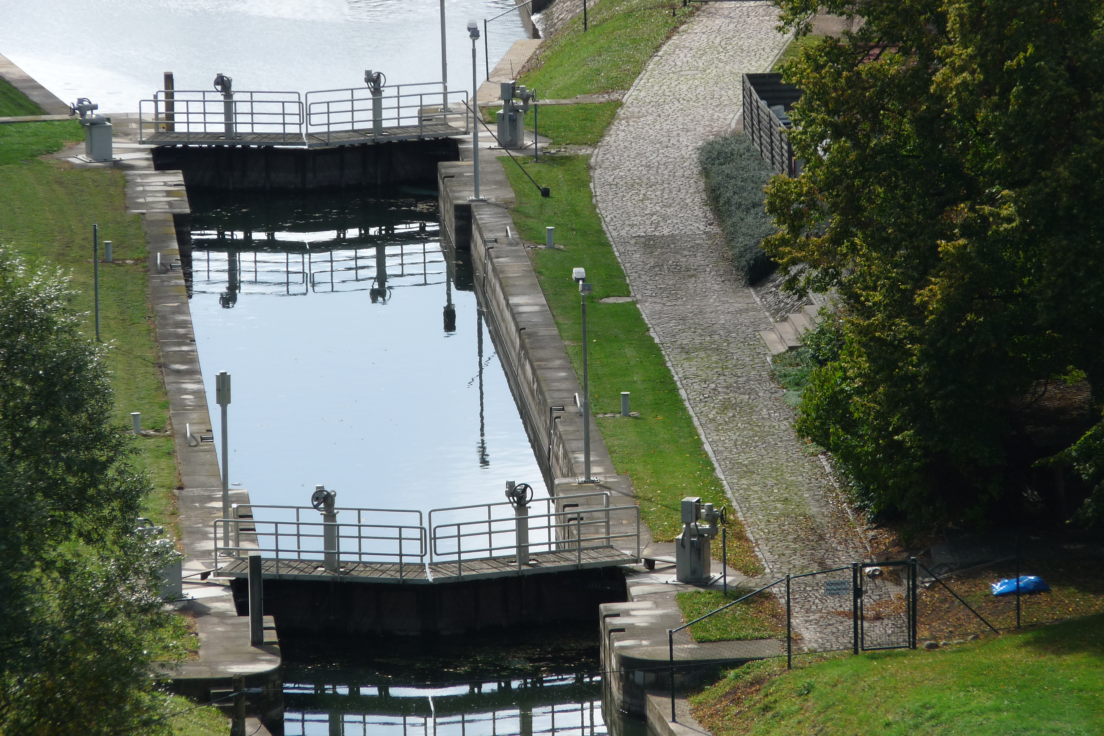 Schleuse Wendelstein, Fluss Unstrut, Kilometer 43,00, Ansicht von der Burg Wendelstein.